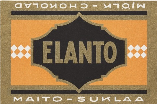 Elannon maitosuklaa käärepaperi